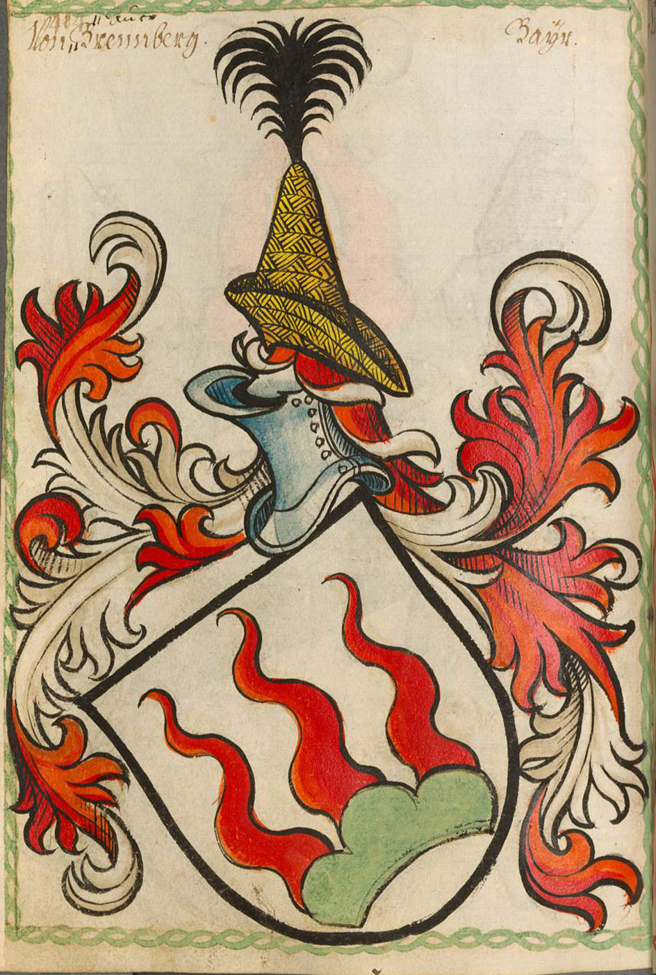 Scheibler'sches Wappenbuch , älterer Teil; Seite 404 Von Brennberg Bayr.